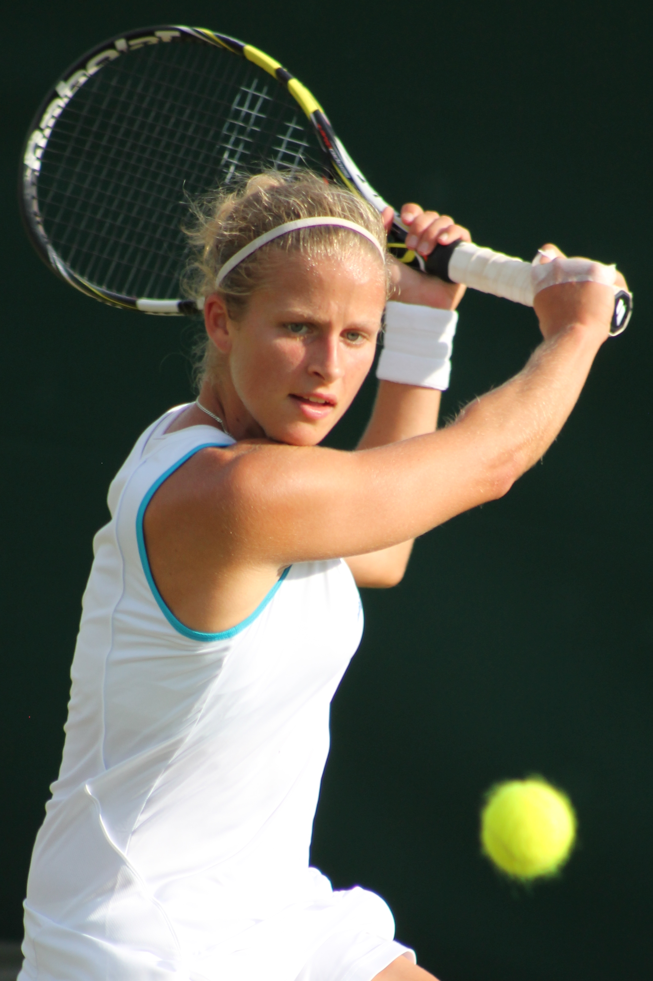 Carreras WMQ15 (5)